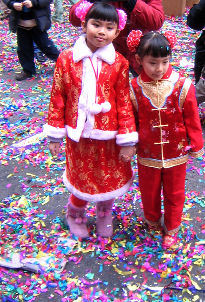 red_girls